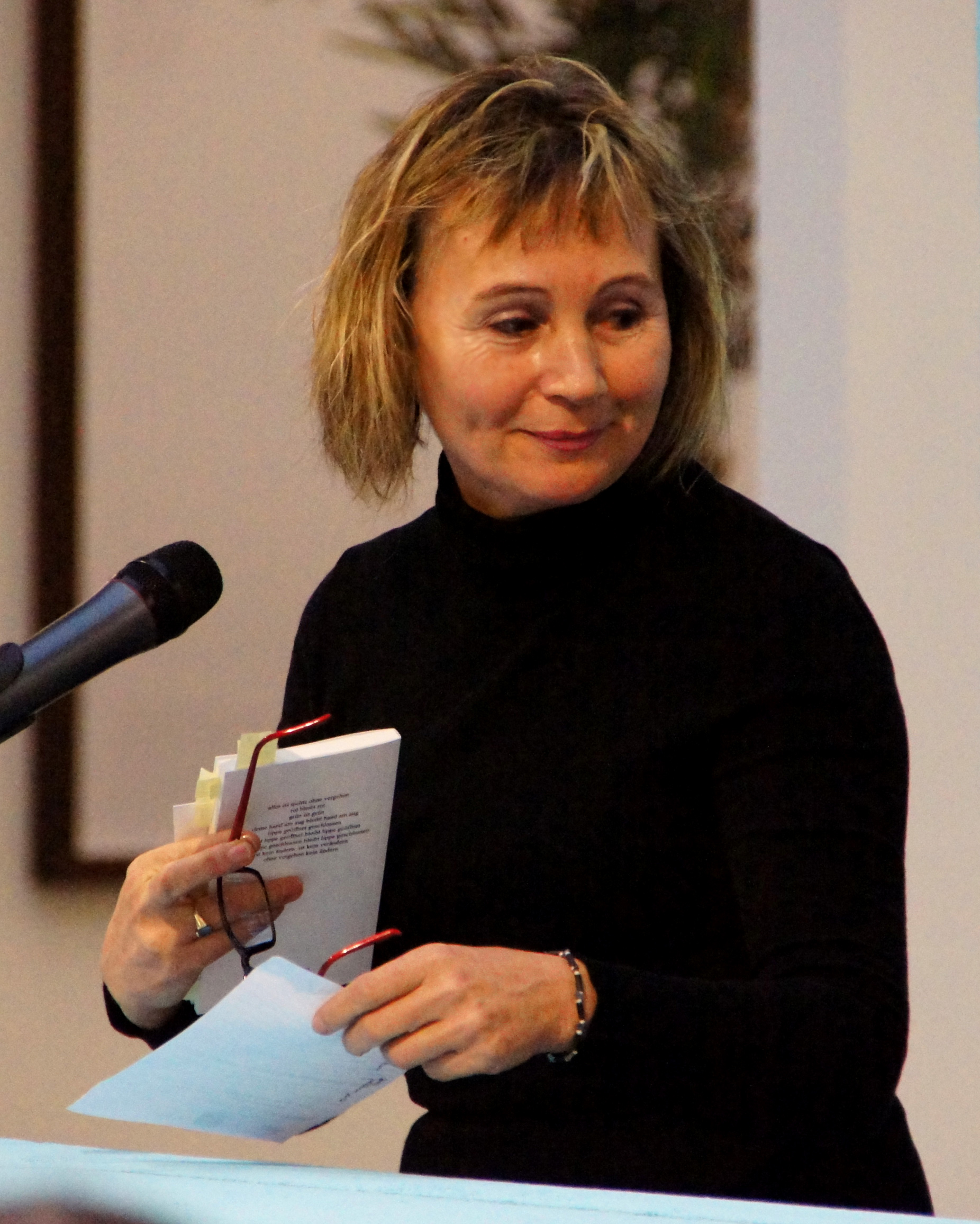 Unter dem Titel "Eine Versammlung kommt selten allein" lasen, anlässlich des 40. Jahrestages der Gründung, Lyriker und Lyrikerinnen der Grazer Autorinnen Autorenversammlung im "Salon für Kunstbuch im 21er Haus". Abgebildete Personen: S. Dateiname.